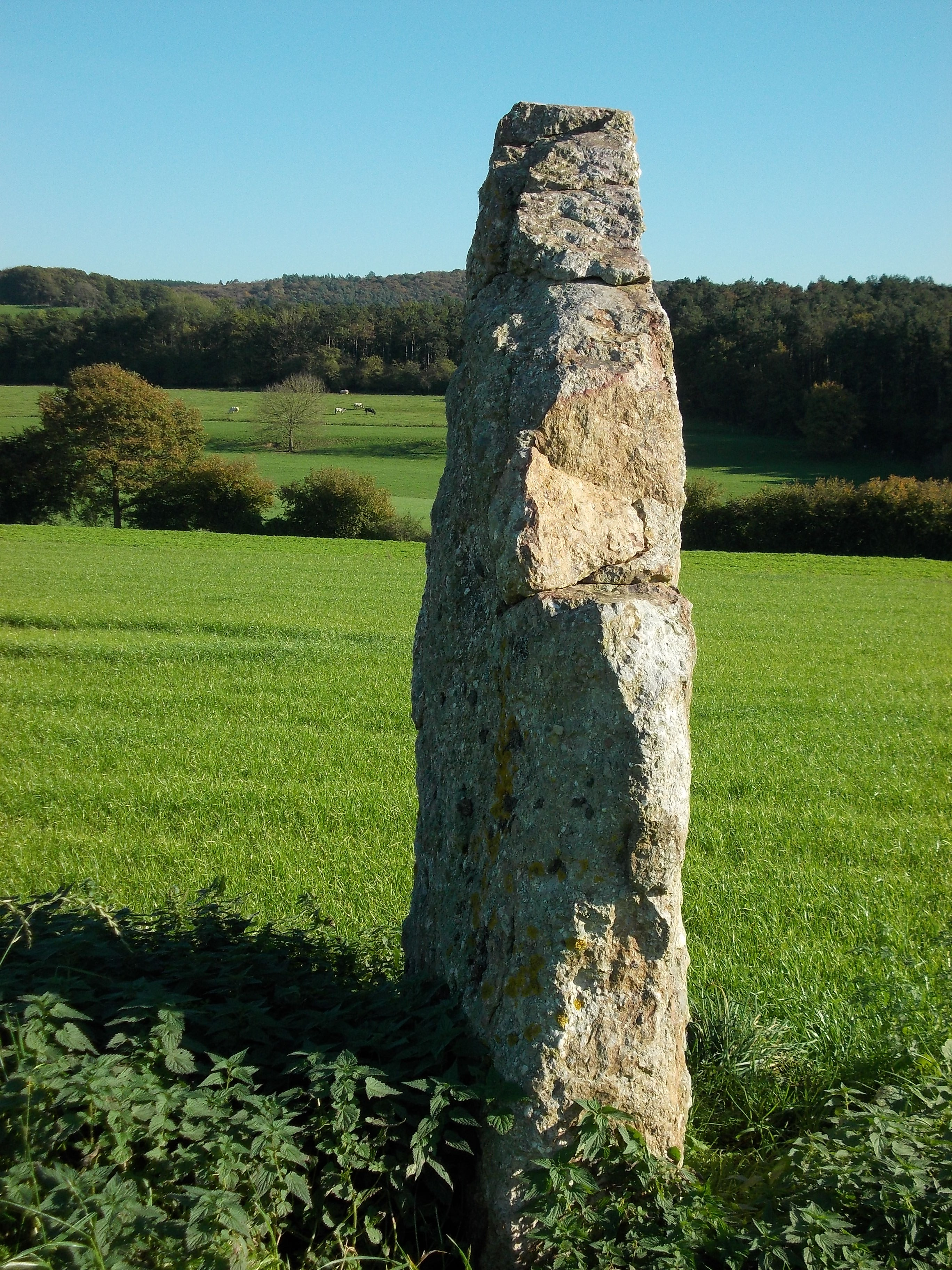 De menhir van Ozo, gezien vanuit het zuidwesten